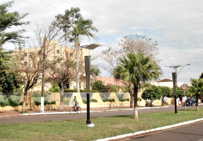 Avenida Mauro Mori em Goioerê